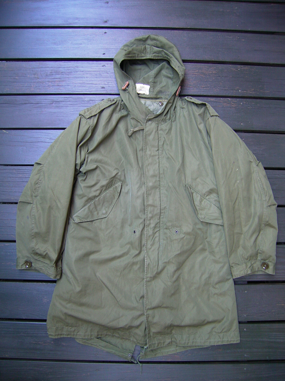 モッズパーカ M-51